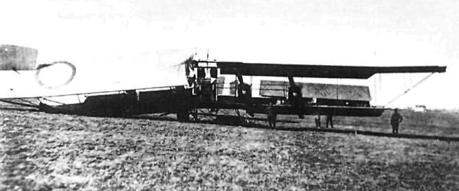 Русский биплан "Илья Муромец - X" 23 апреля 1916 года, после налета на станцию Даудзевас